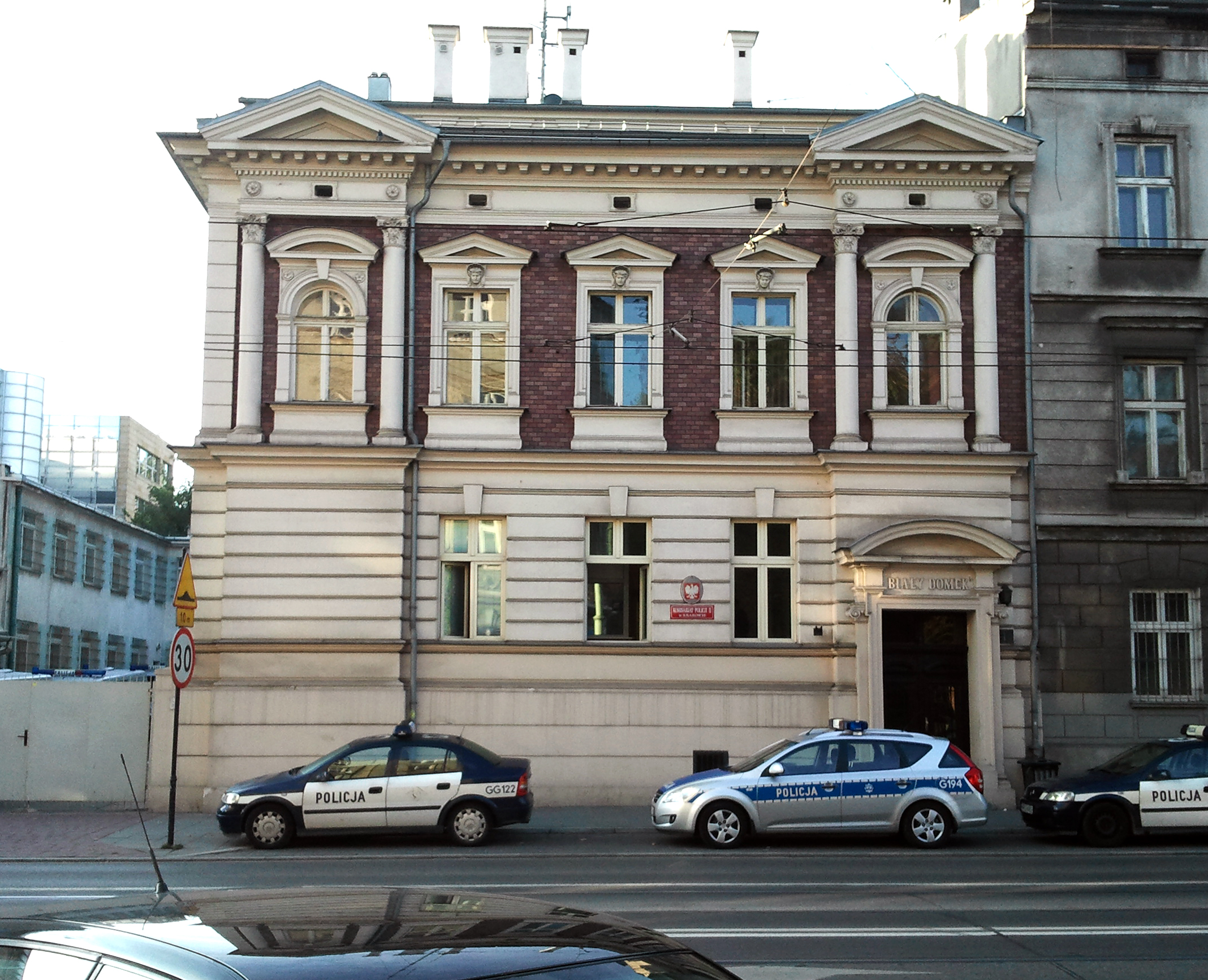 Willa Biały Domek/obecnie Komisariat Policji, Kraków, ul. Lubicz 21.